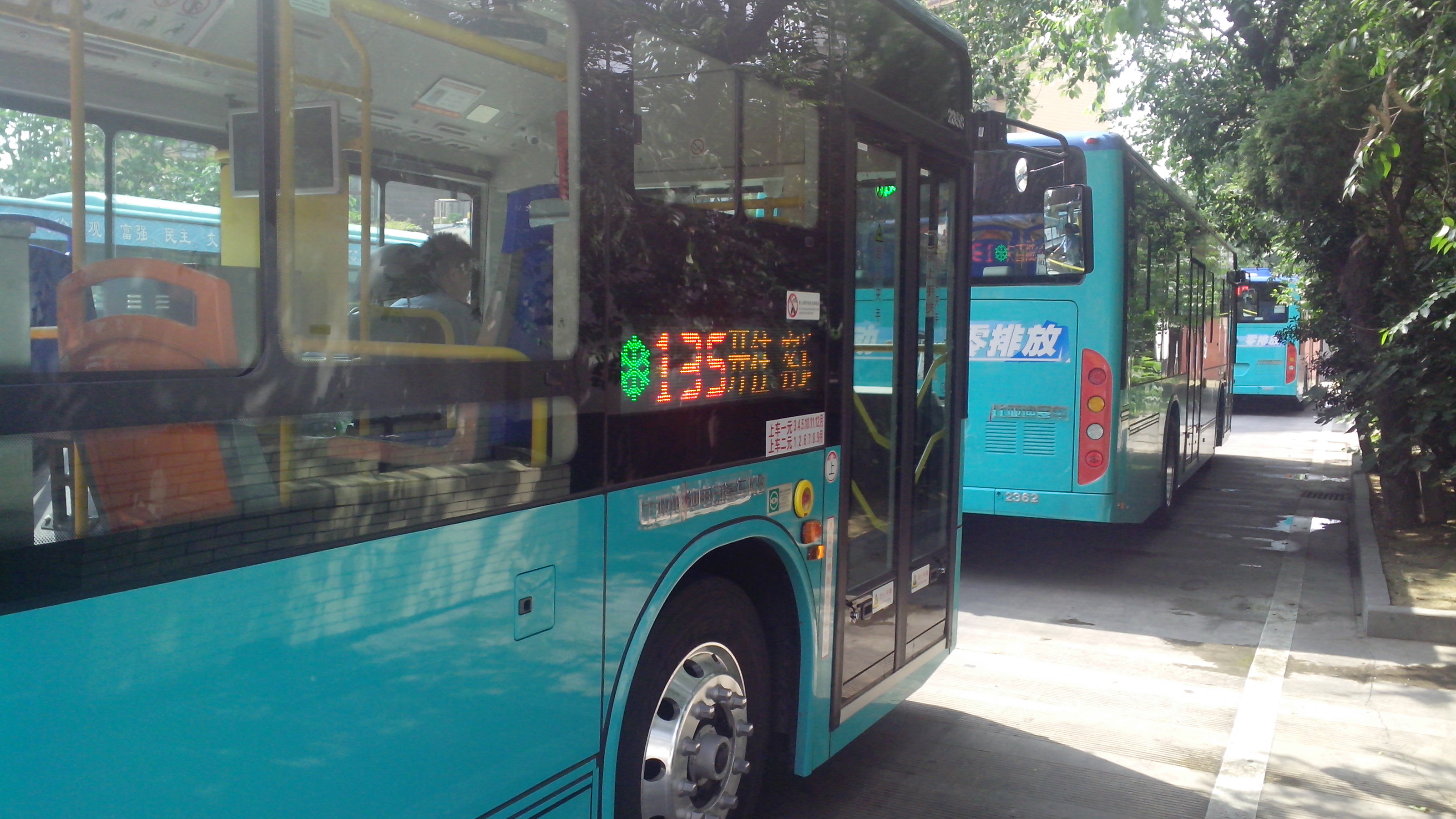 中文（中国大陆）: Bengbu Bus No.135 at Zhanggonghu